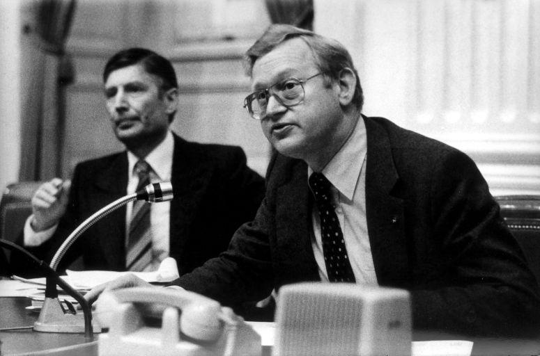 Minister Frans Andriessen naast van Agt 23-5-1979